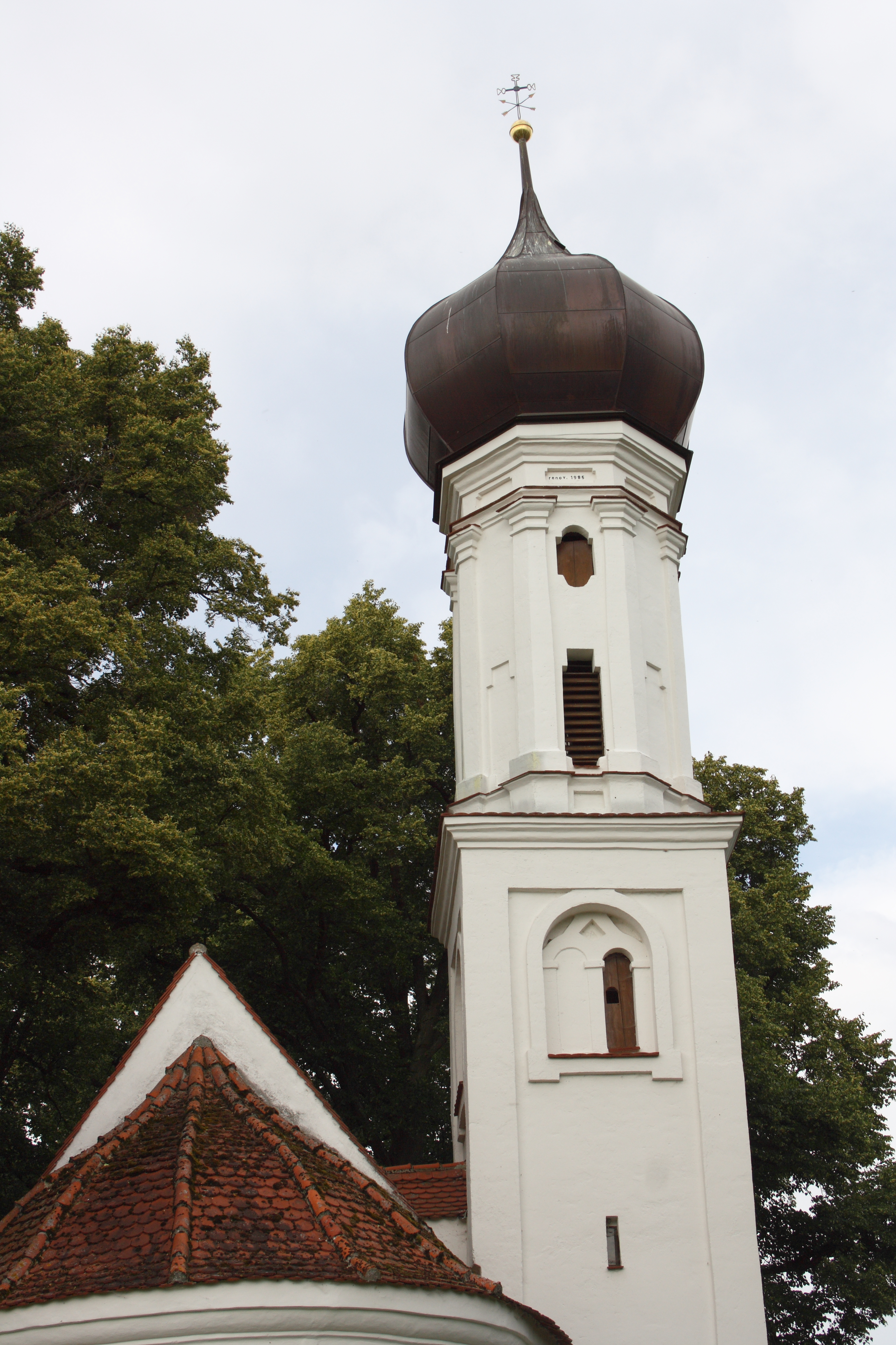 Katholische Kapelle St. Sebastian in Holzheim im Landkreis Dillingen an der Donau (Bayern), 1716 im Burgstallgelände auf dem Sebastiansberg errichtet, Turm mit Zwiebelhaube